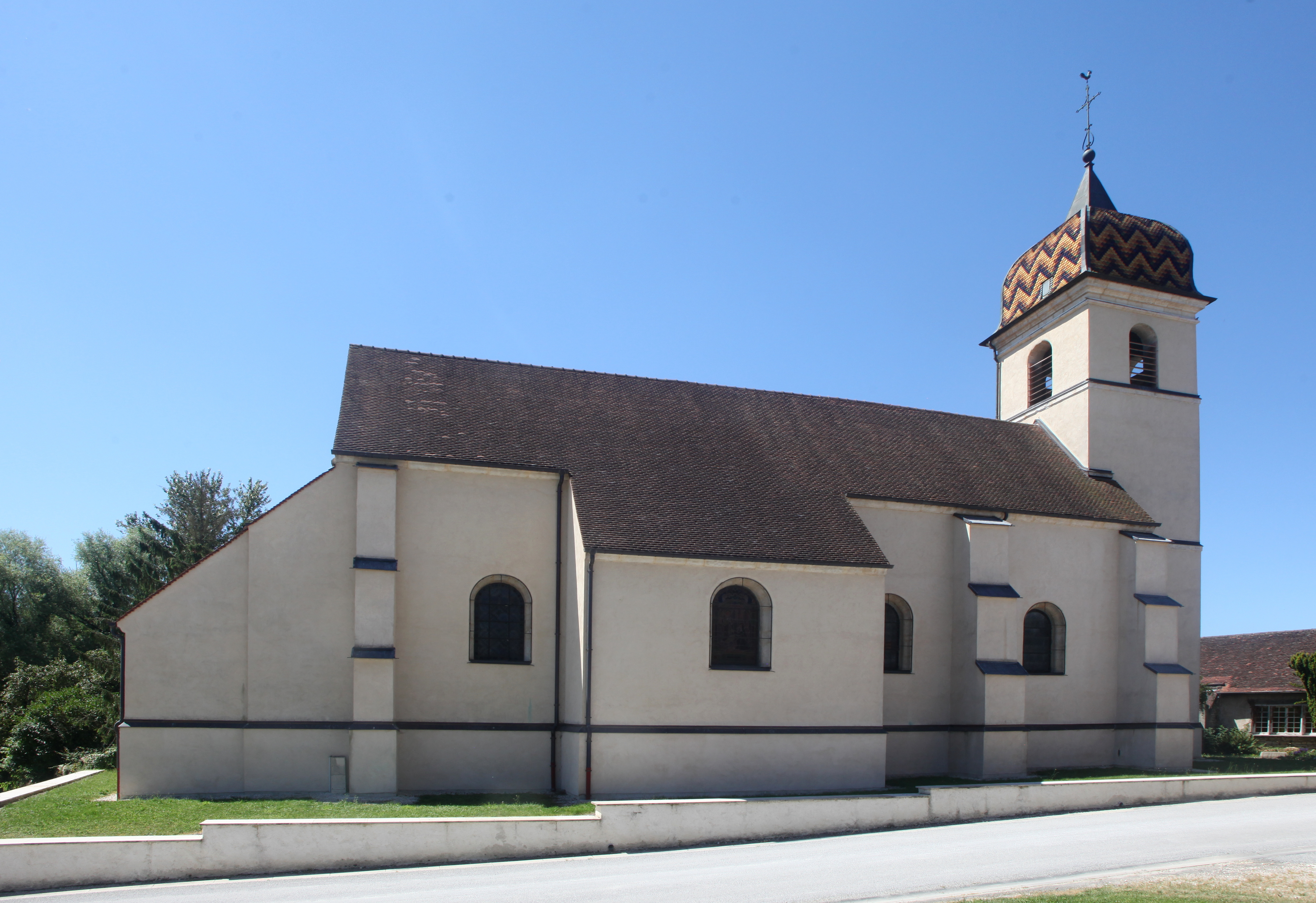 Église de Bresilley (Haute-Saône).